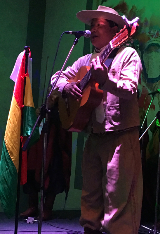 Concierto en la Ciudad de Tarija (2018)